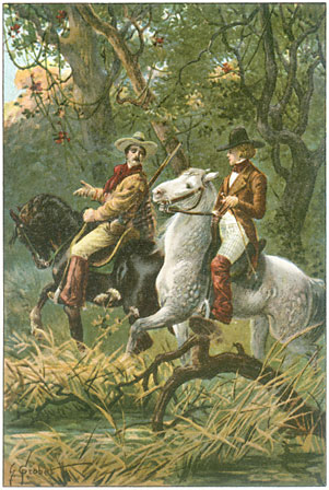 Illustration von H. Grobet († vor 1919) in Die Flußpiraten des Mississippi. Für die Jugend neu bearbeitet von Karsten Brandt. Mit 4 Buntbildern von H. Grobet. Stuttgart, Loewes Verlag Ferdinand Carl. (1907).